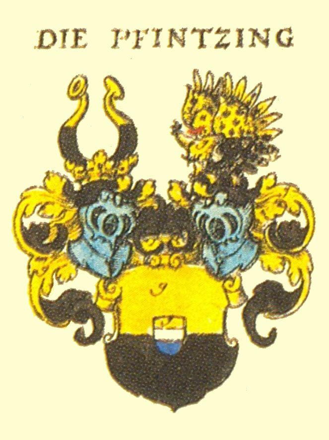 Wappen der Nürnberger Patrizierfamilie Pfinzing von Henfenfeld